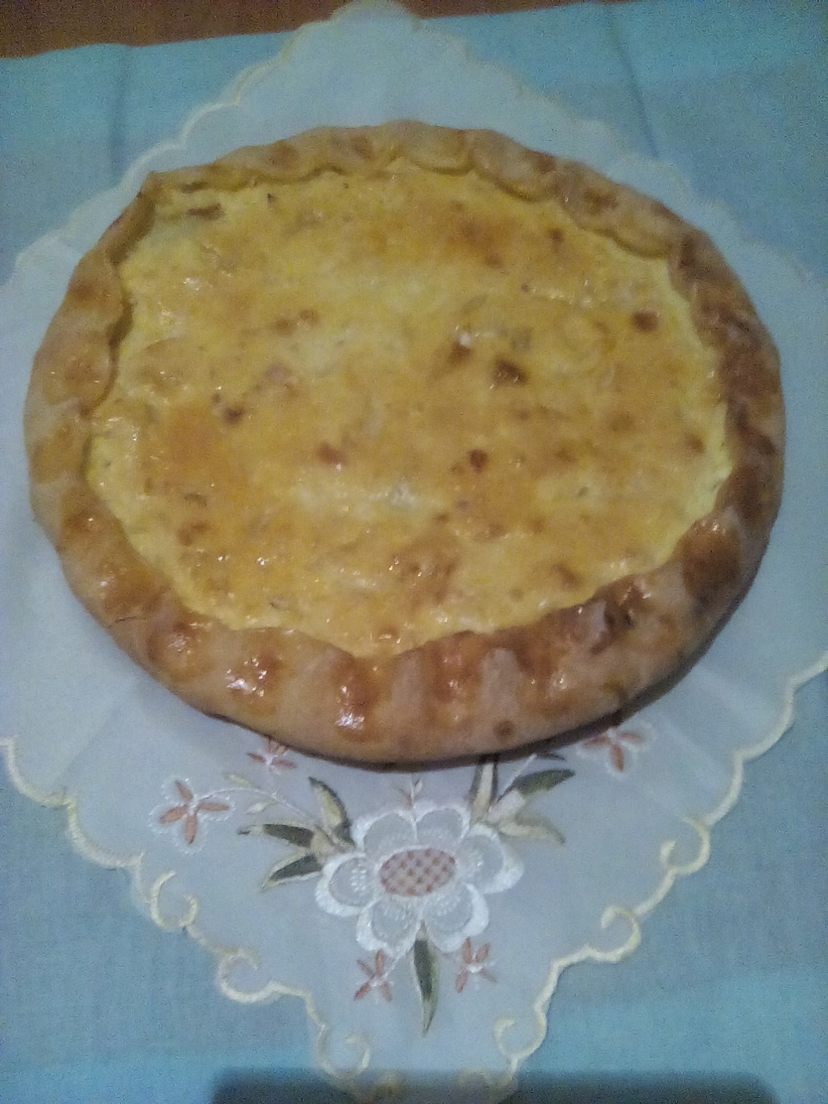 Башҡортса: Бөрйән районының Байназар ауылында йәшәүсе Ҡотлобаева Көнһылыуҙың эше